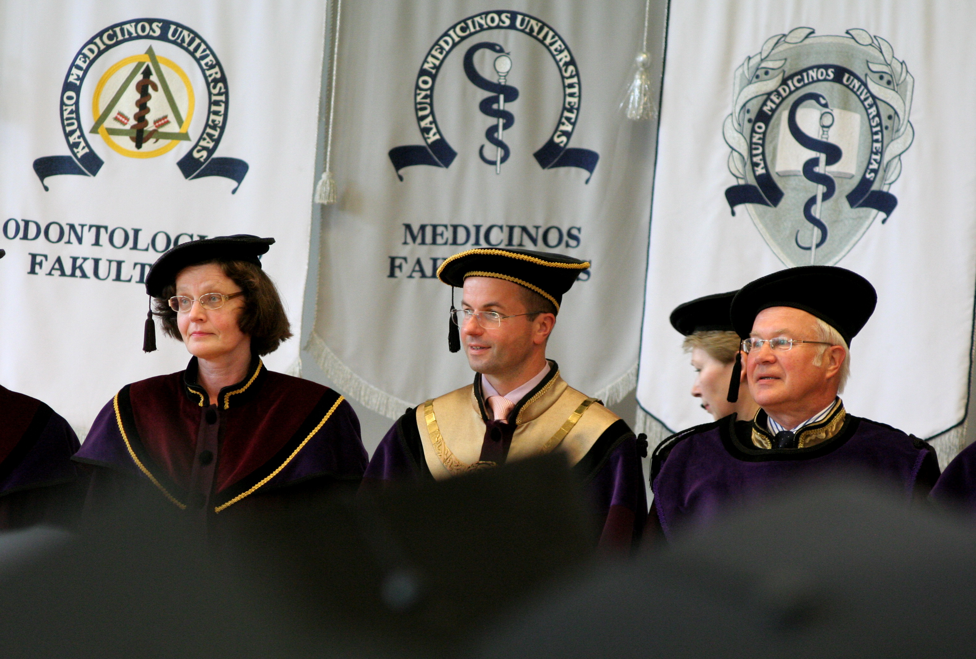 Lietuvos sveikatos mokslų universiteto Medicinos akademijos vadovybė. Viduryje rektorius Remigijus Žaliūnas, dešinėje kancleris Vilius Grabauskas